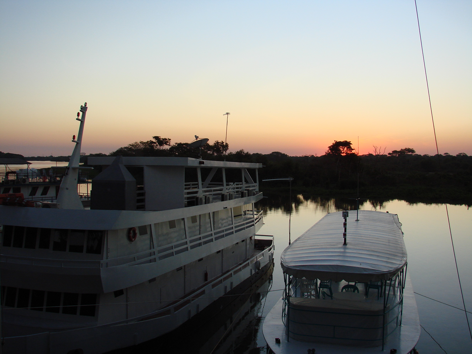 Rio Paraguai passando pelo centro da cidade de Cáceres-MT